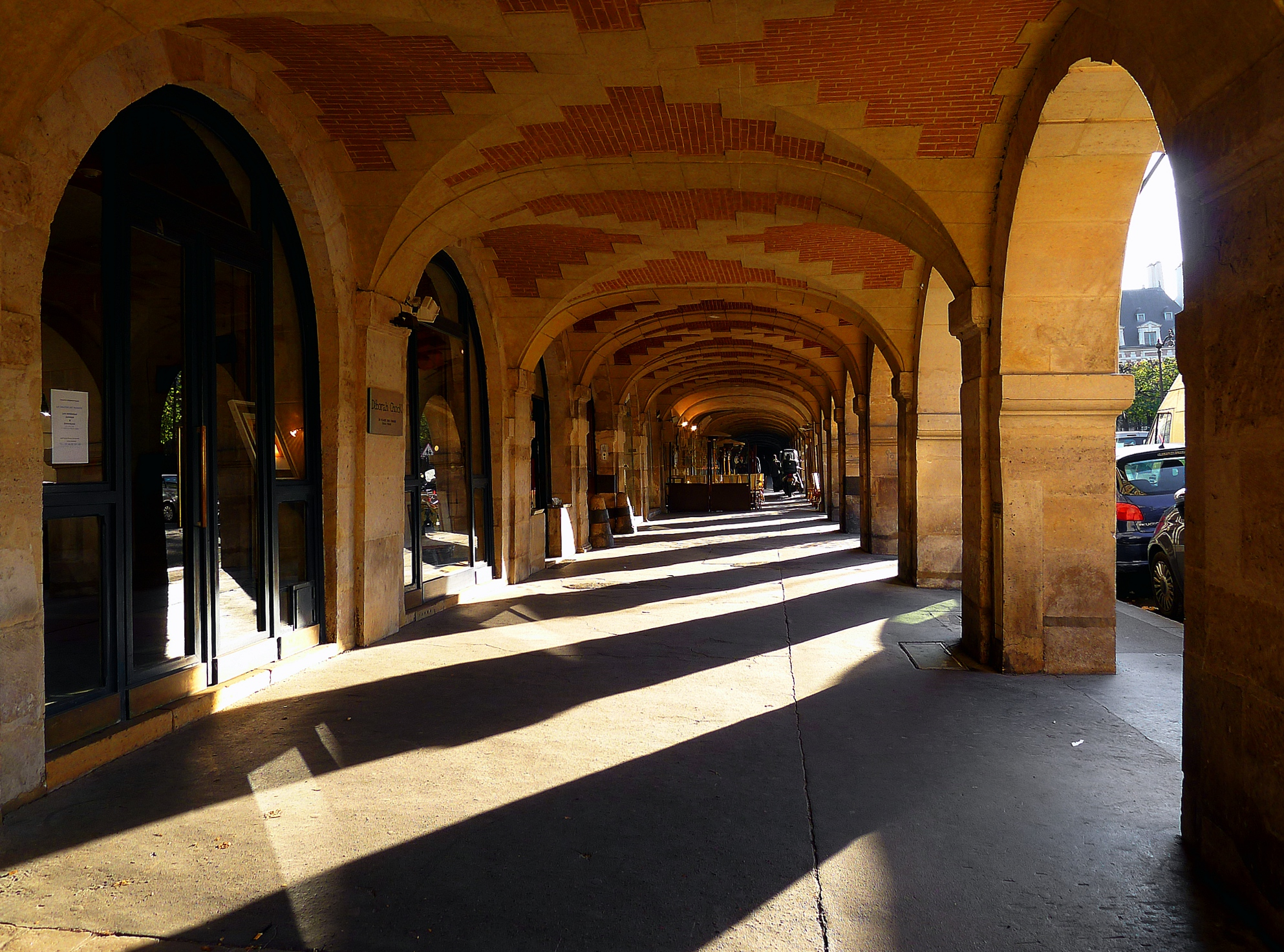 Place des Vosges, arcades du côté Est - Paris IV